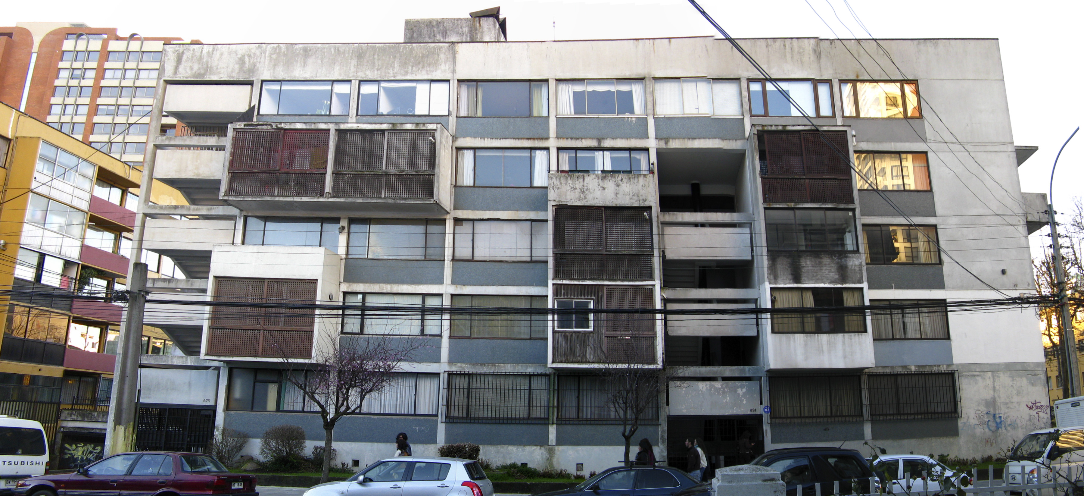 Edificio Arauco Concepción, Chile Julio de 2012